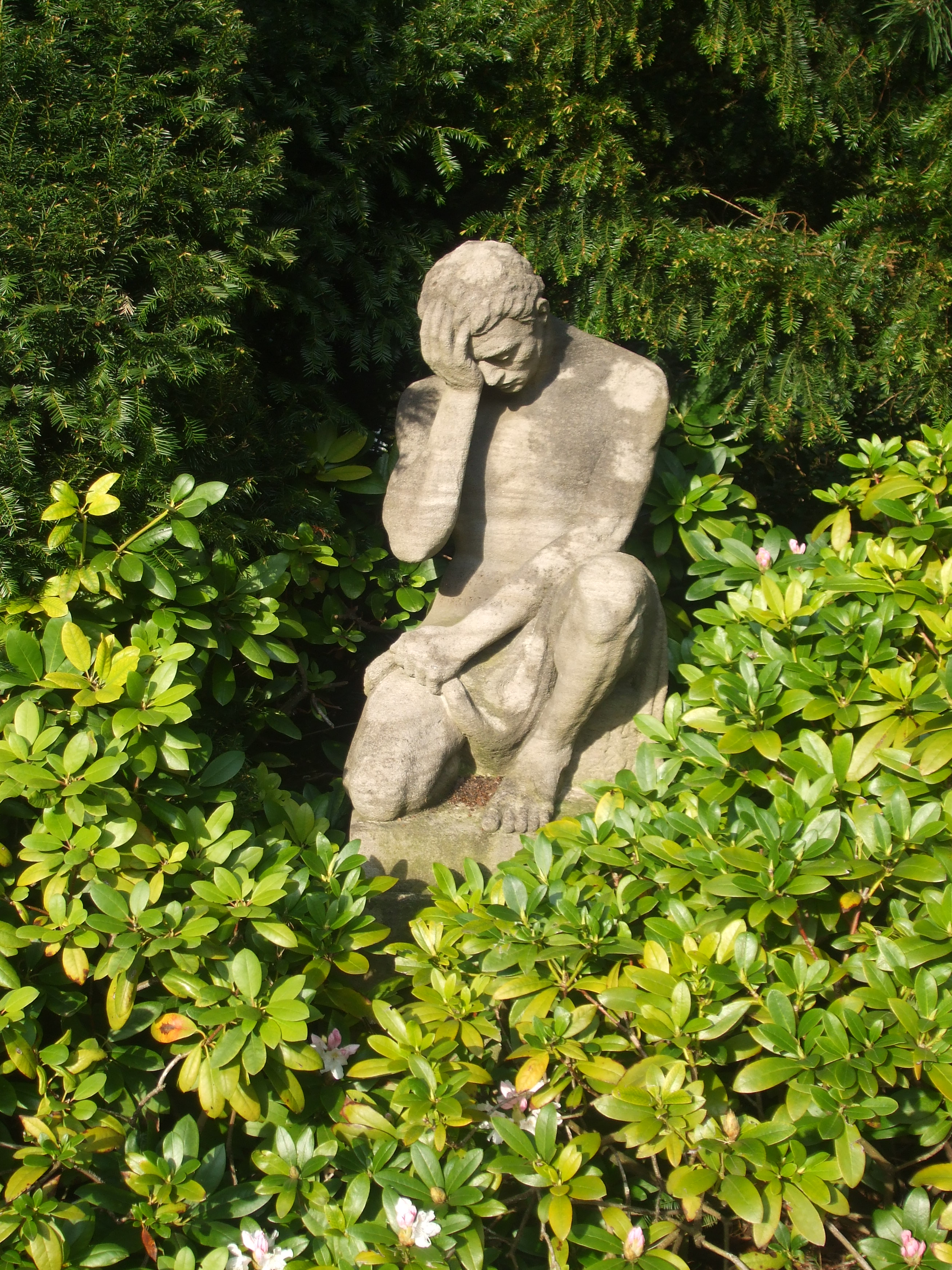 Waldfriedhof Aachen; diese Skulptur steht innen gegenüber dem Eingang